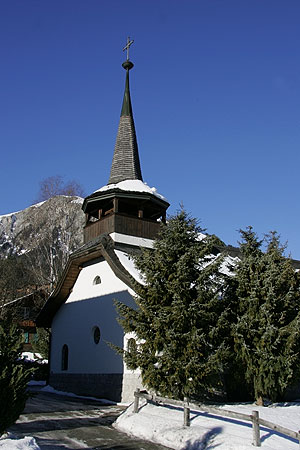 Katholische Kirche in Lenk